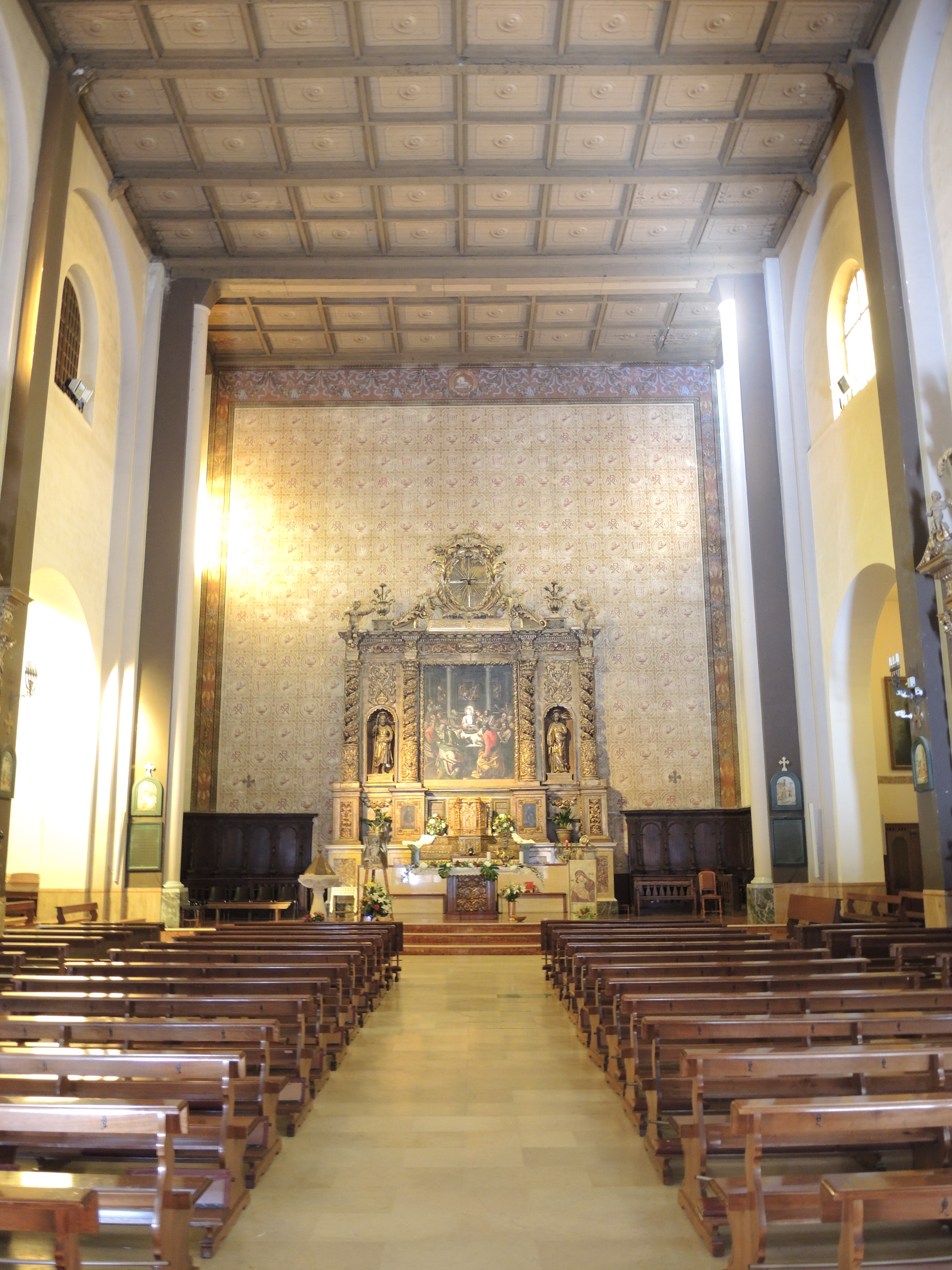 Montorio al Vomano: Chiesa di San Rocco